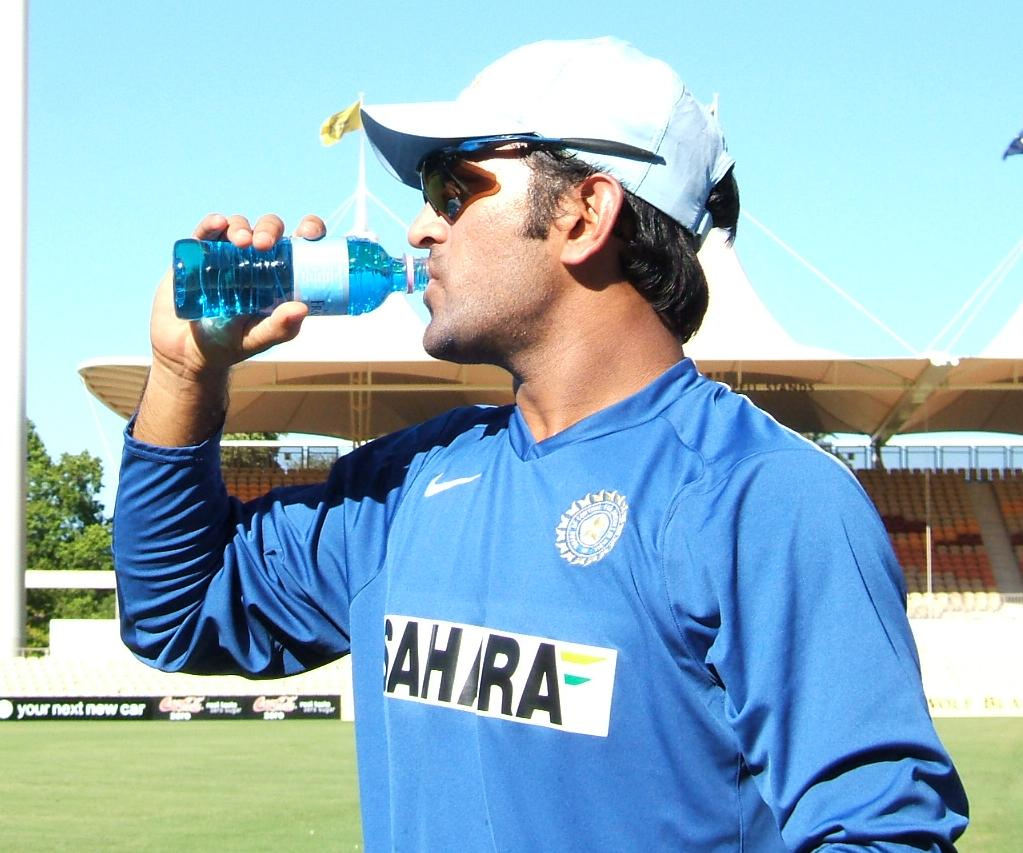 Mahendra Singh Dhoni at Adelaide Oval